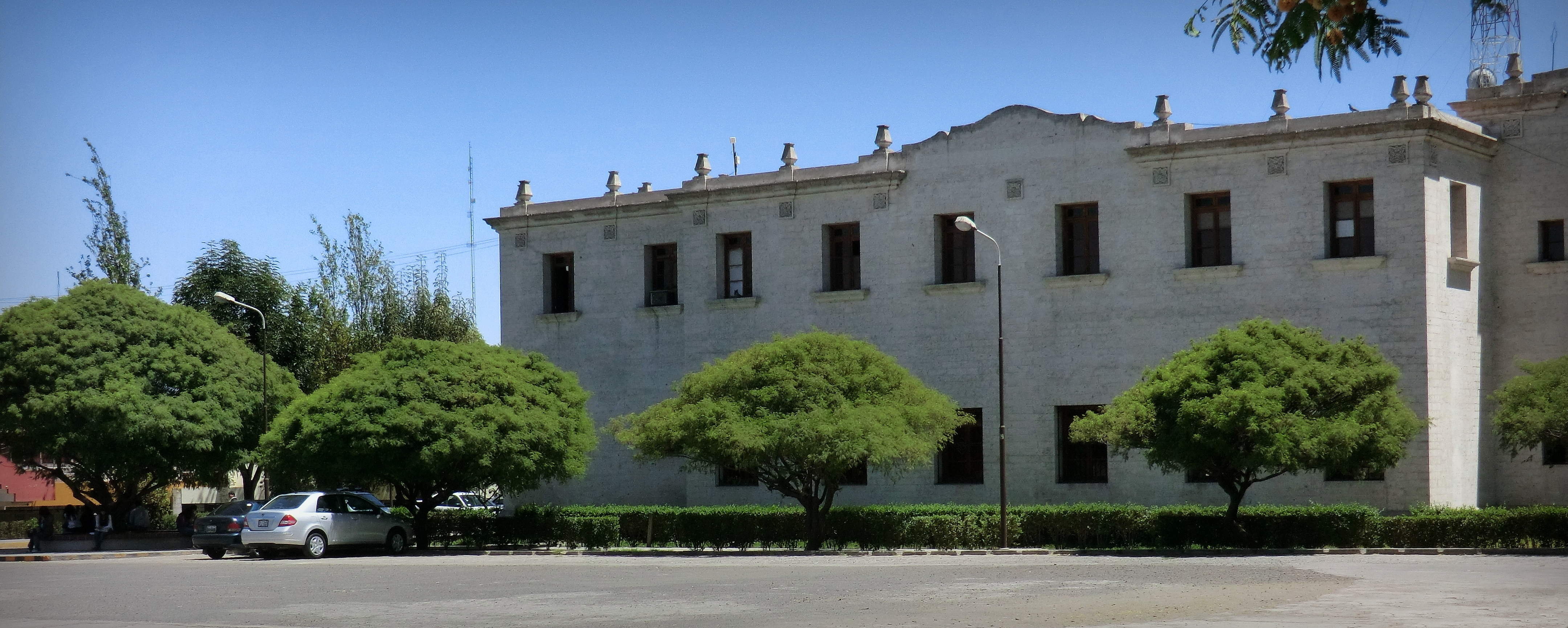 Pabellón de la Cultura, UNSA